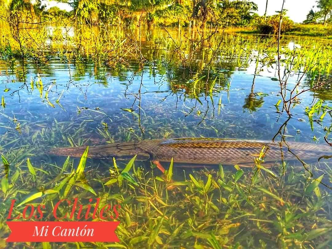 Gazpar